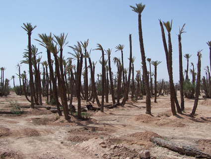 Verwoestijning van een voormalige dadelplantage in de buurt van Marrakech, Marokko